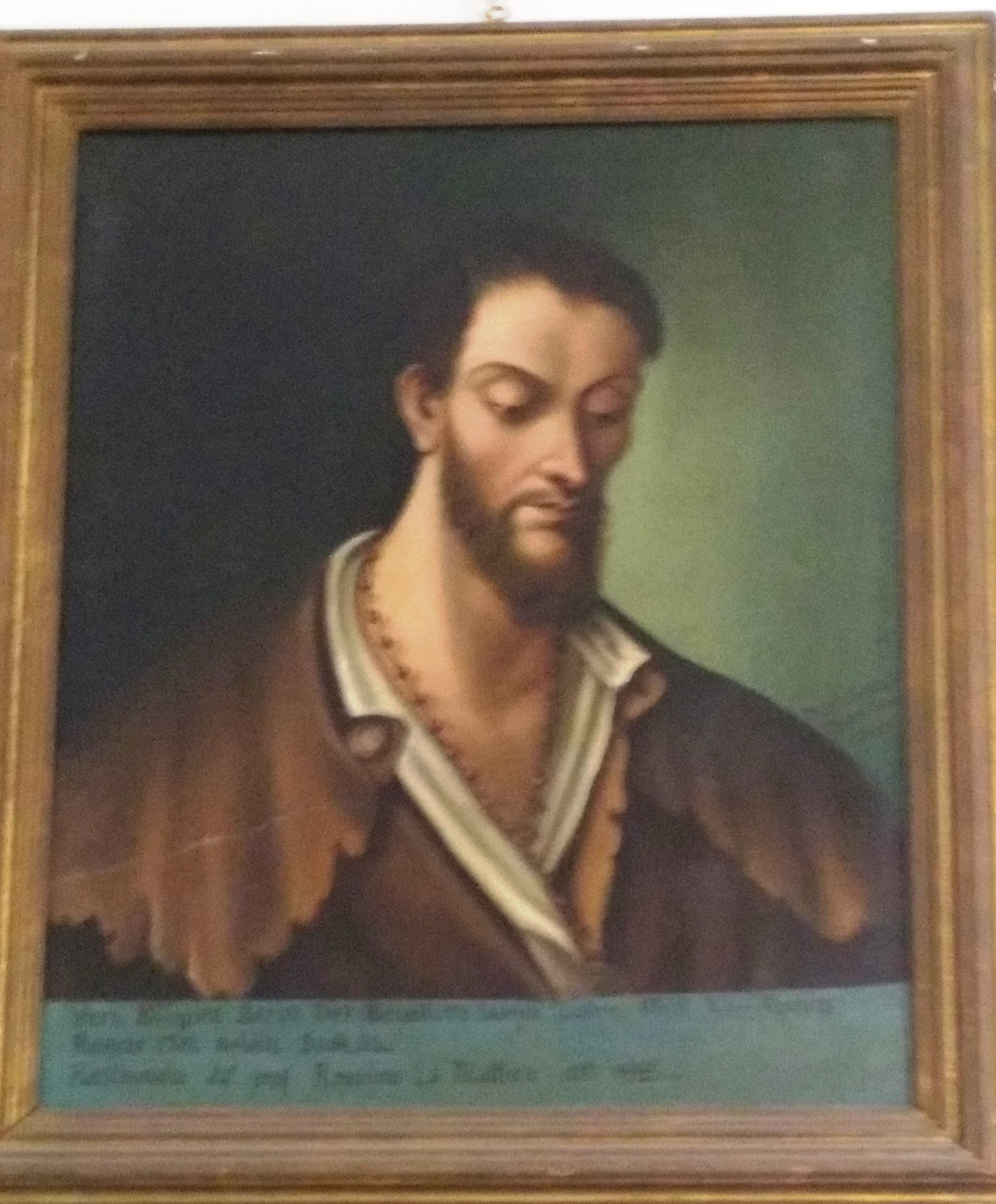 Dipinto di Nicolò Pizzitola